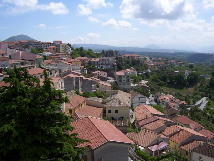 Tetti di Contursi Terme